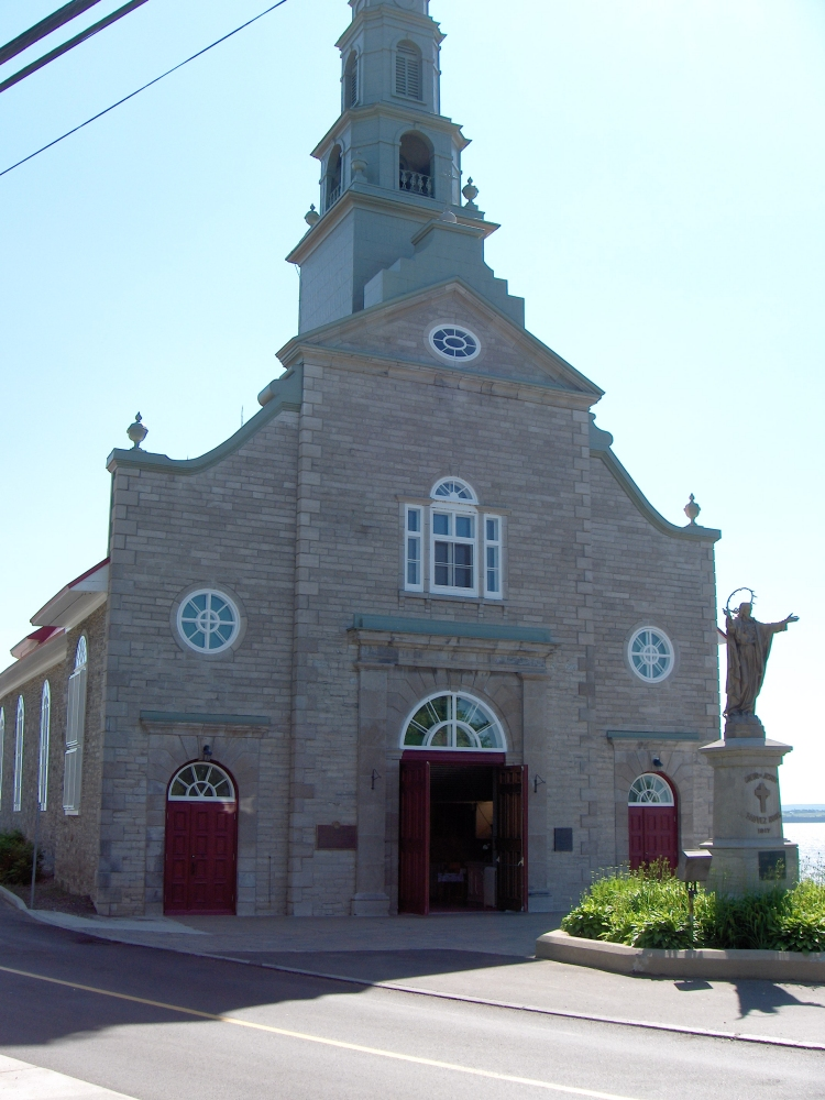 Église St-Jean de l'Île d'Orléans